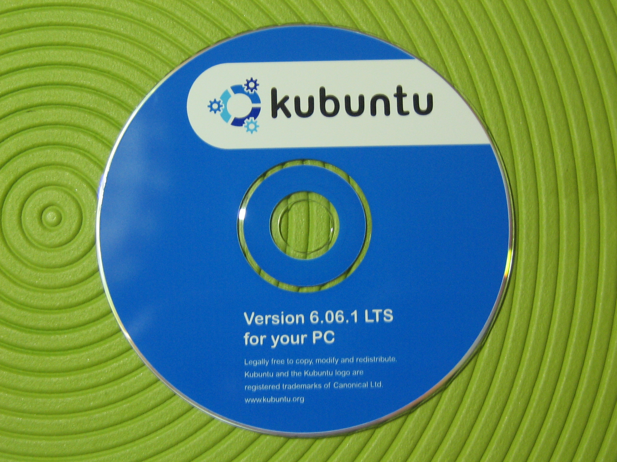 Kubuntu 6.06 CD